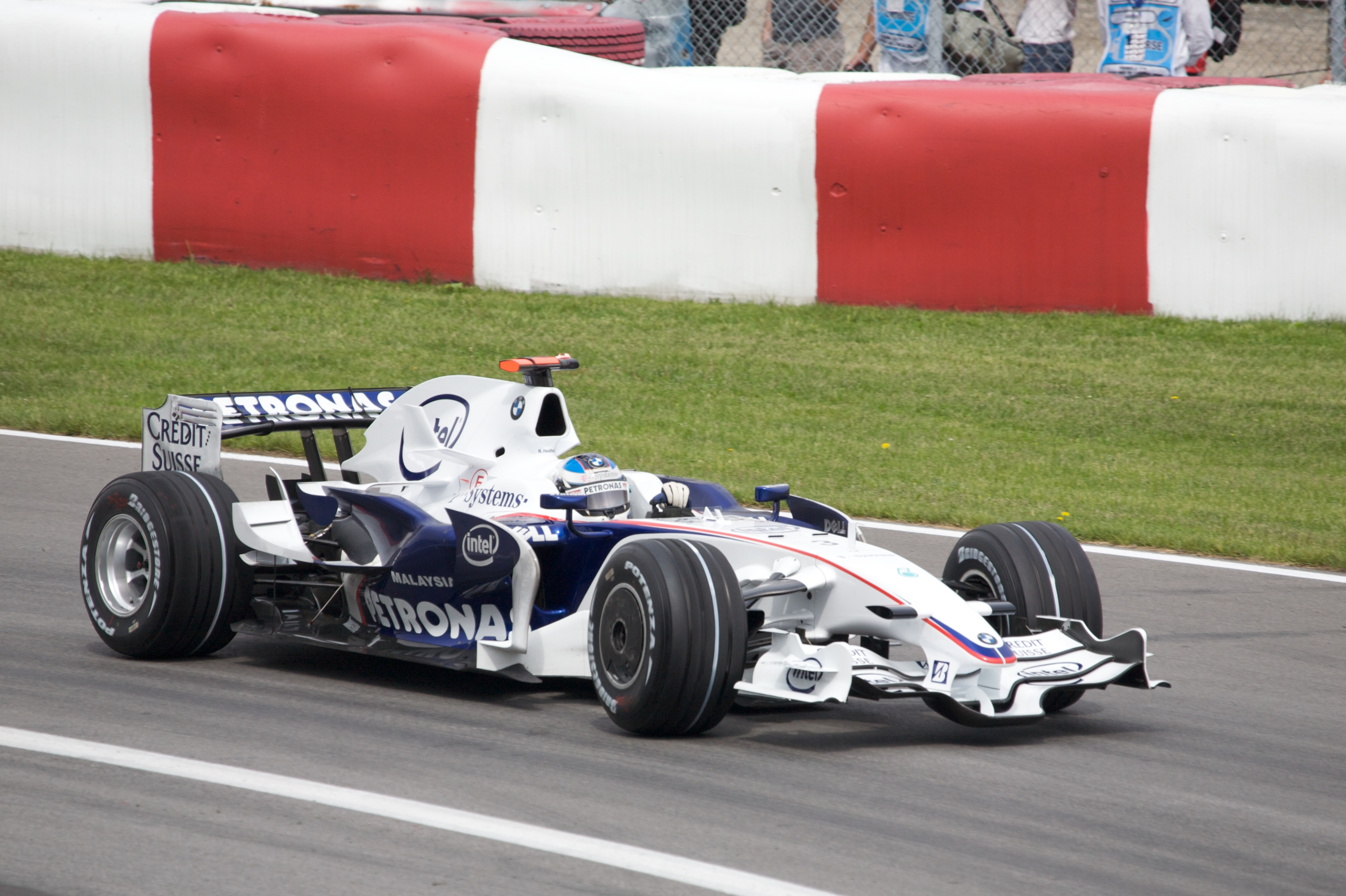 Heidfeld at Canada 2008